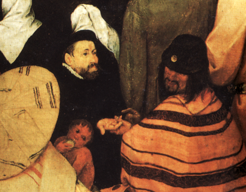 Ausschnitt aus Pieter Bruegels Gemälde Die Predigt Johannes des Täufers: Ein Zuhörer liest einem anderen aus der Hand.